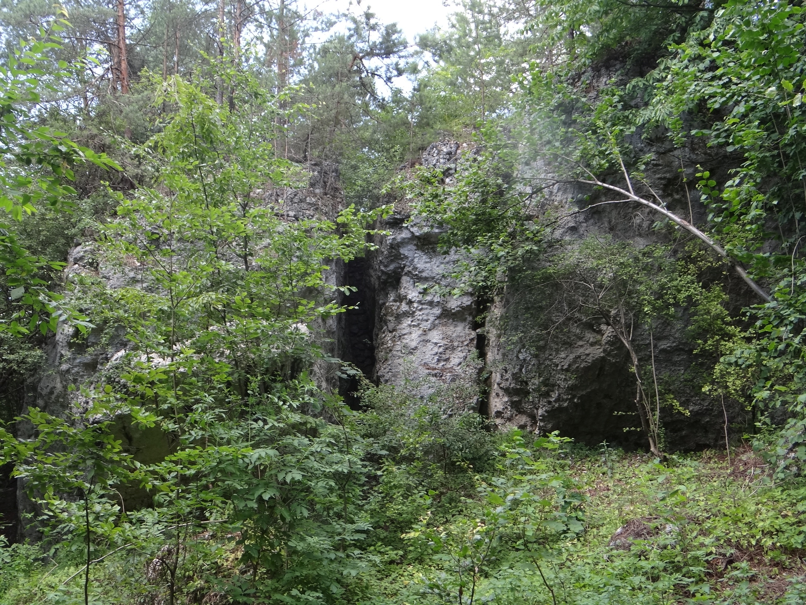 Pomorzańskie Skałki ze schroniskiem Okap koło Wapiennika i murem dawnego wapiennika